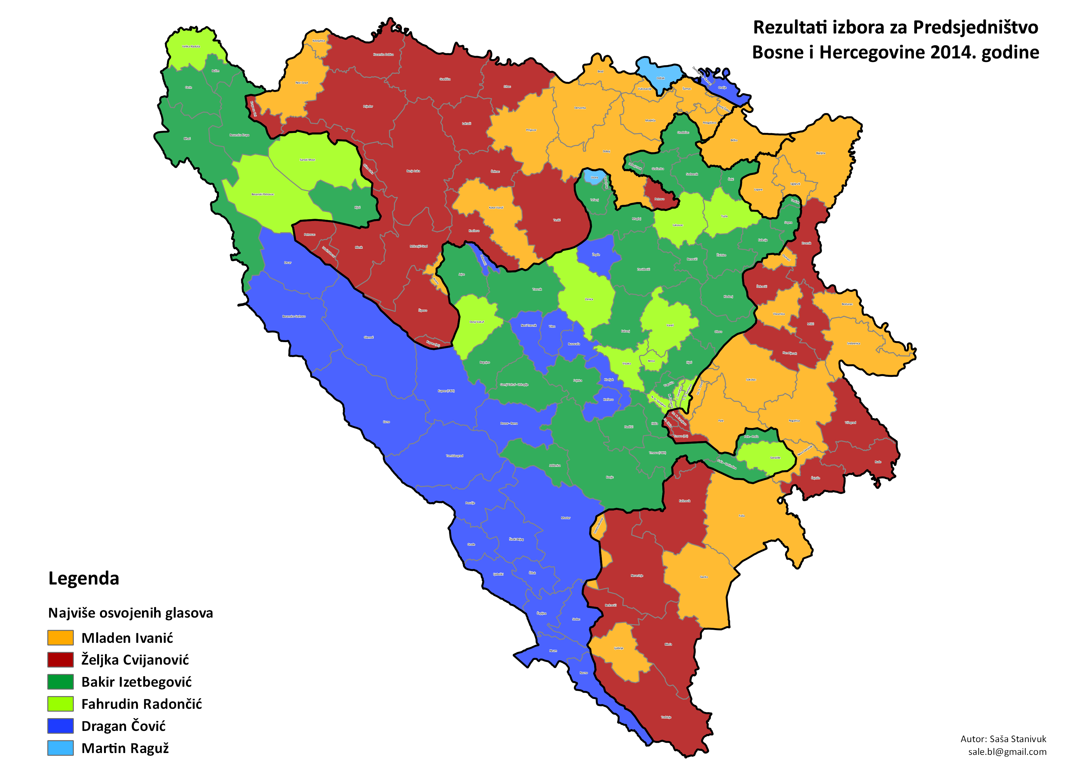 Srpskohrvatski / српскохрватски: Izbori za Predsjedništvo BiH 2014. godine